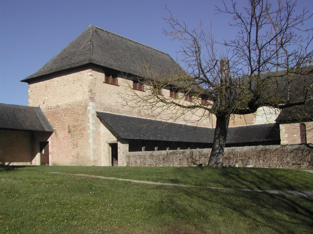 Maison du Jurançon à Lacommande